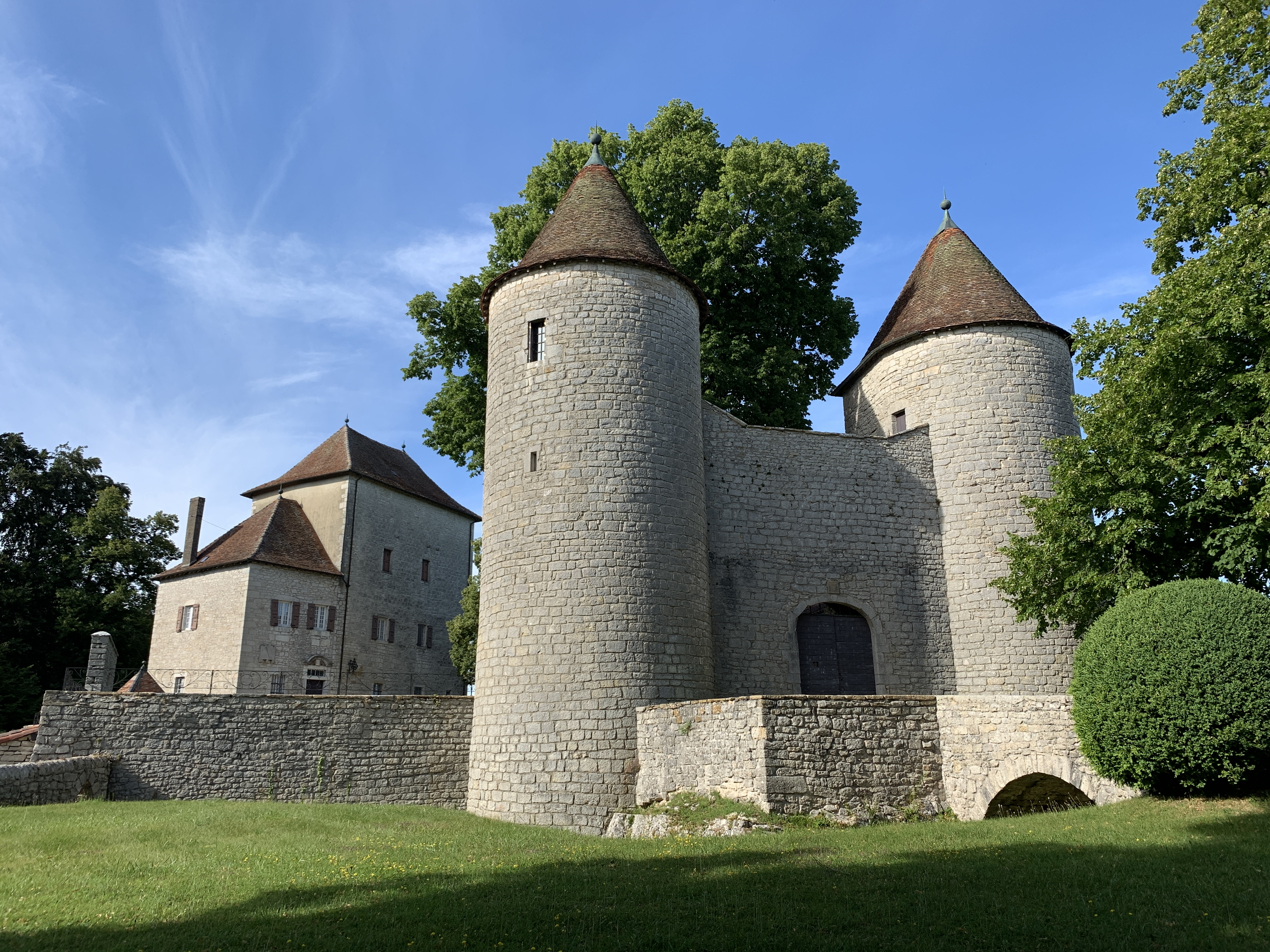 Château d'Andelot, Andelot-Morval.